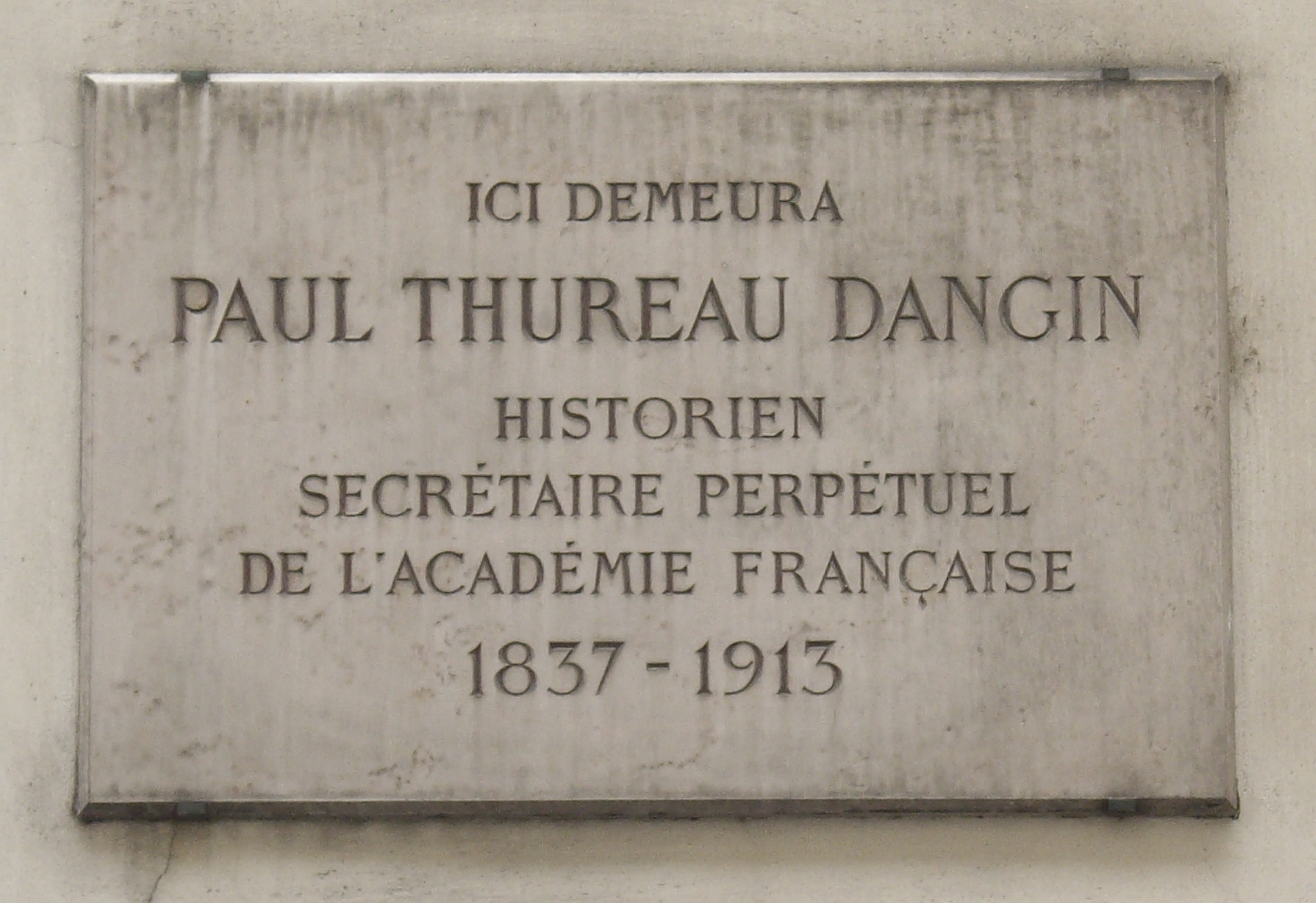 Plaque apposée au n° 11 de la rue Garancière, Paris 6e, où habita l'historien Paul Thureau-Dangin (1837-1913).